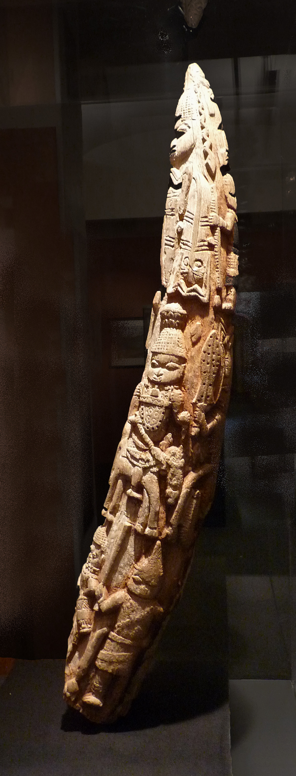 Défense sculptée qui ornait l'autel du roi d'Abomey. Les motifs représentent la dynastie royale du Bénin et des dignitaires de la cour. Musée de la Compagnie des Indes (Lorient)